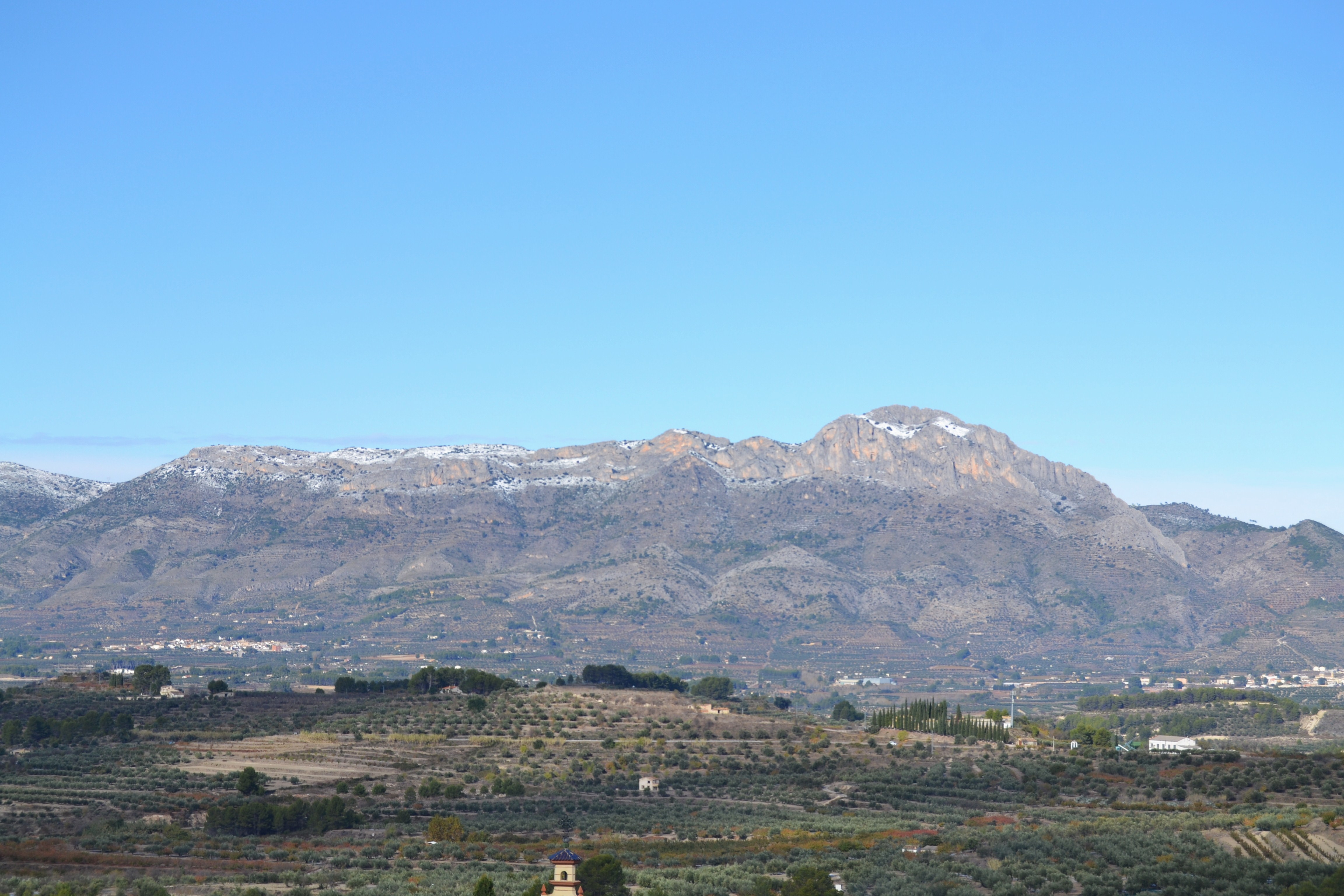 Serra del Benicadell des de Benialfaquí.